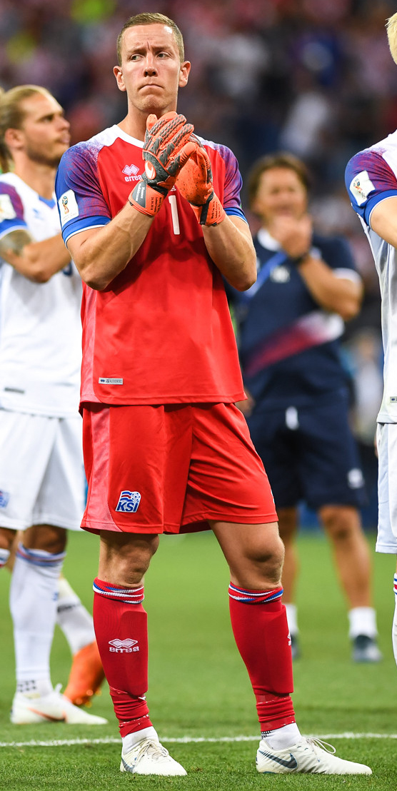 Сборная Исландии уступает Хорватии и покидает ЧМ-2018